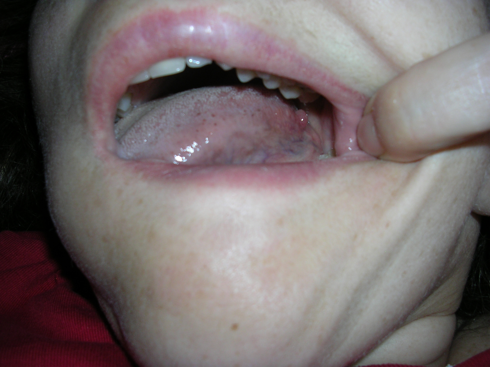 tongue papillas